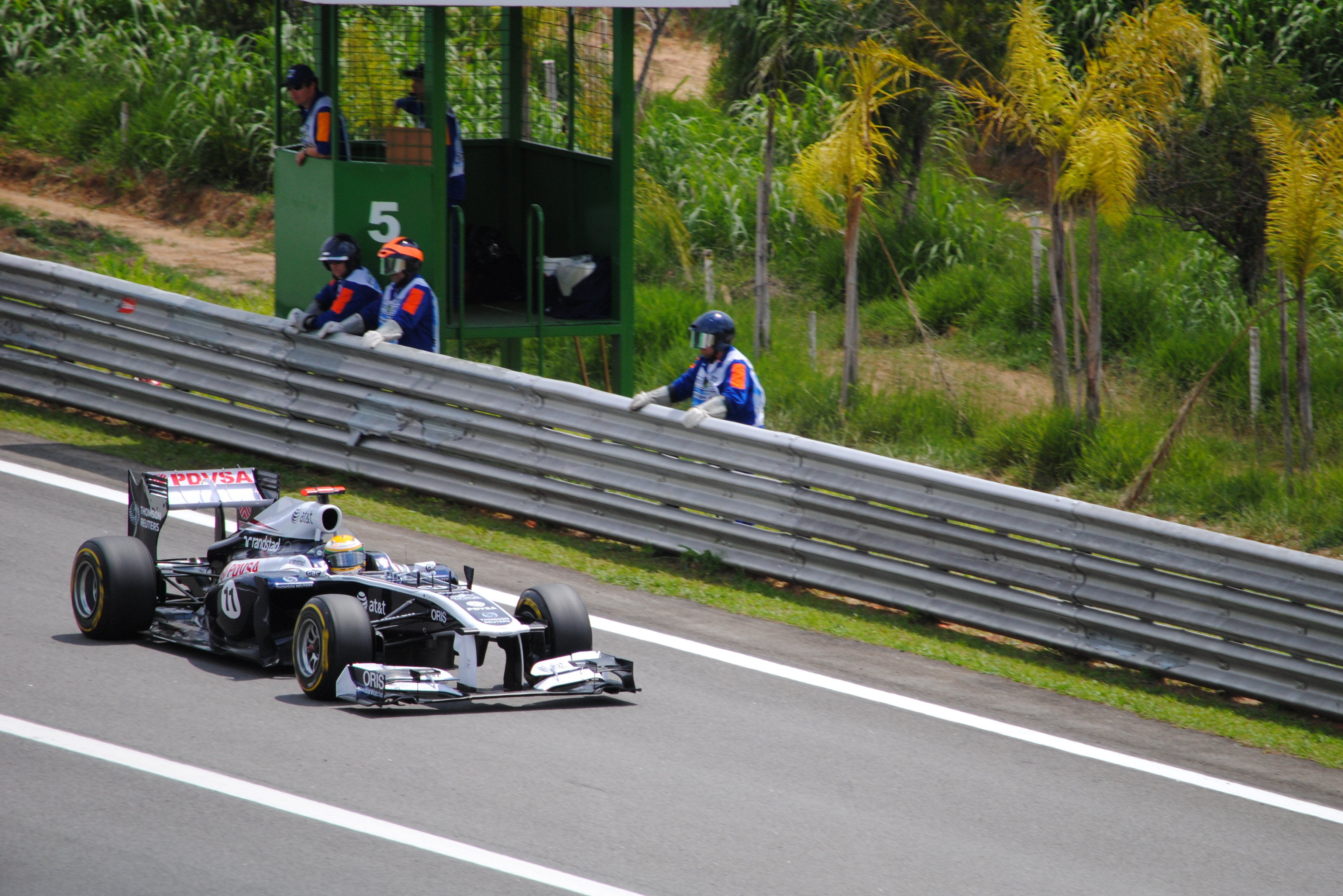 GP Brasil de Formula 1 - Interlagos, São Paulo.